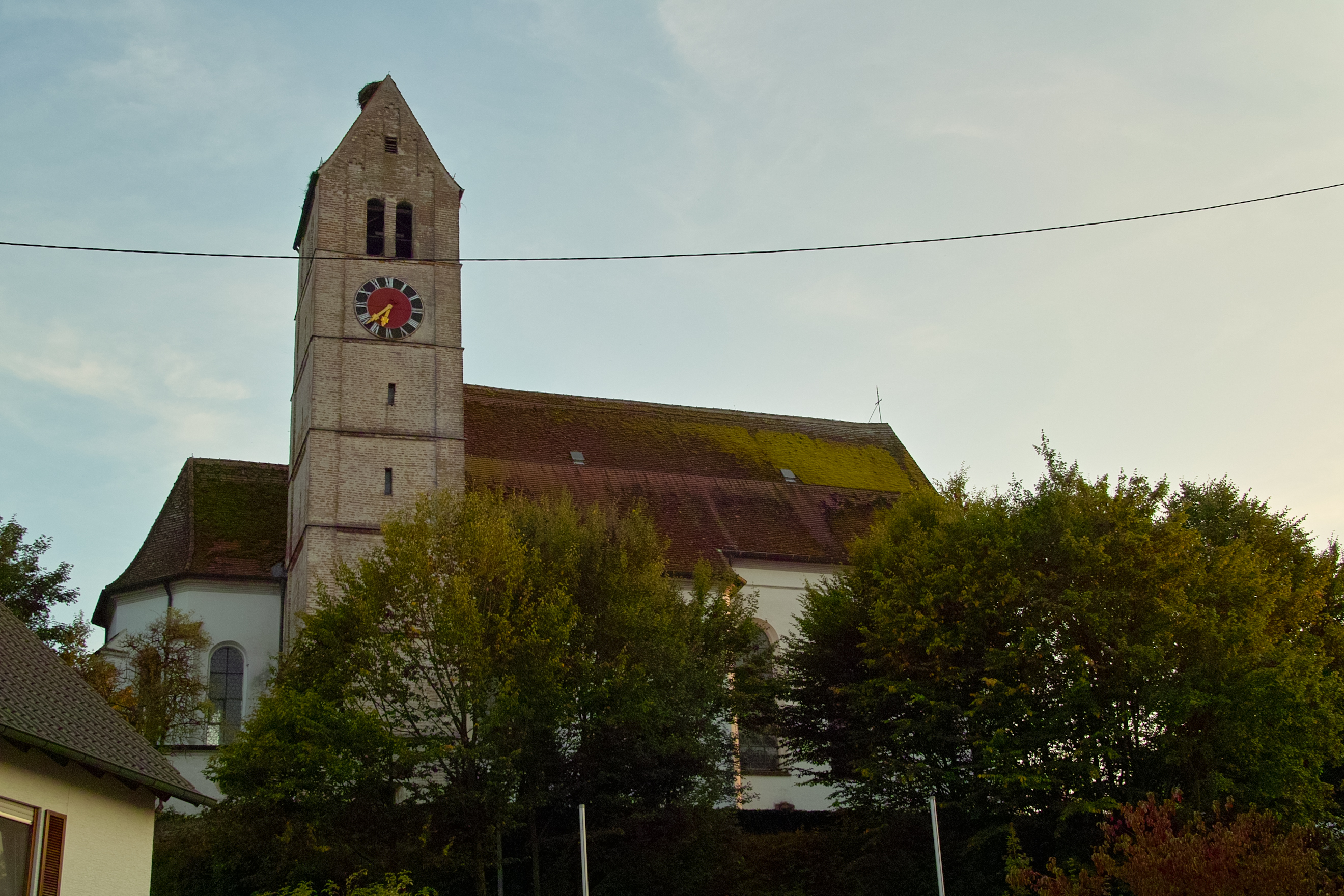 Pfarrkirche St.Martin, Nordseite